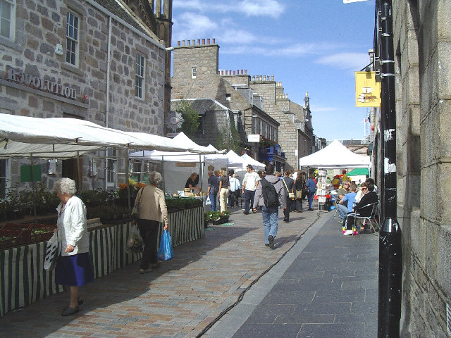 Belmont Street Market, Aberdeen, Scotland